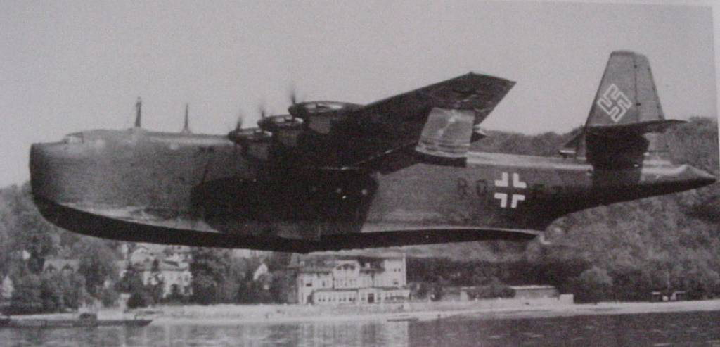 Старинная фотография